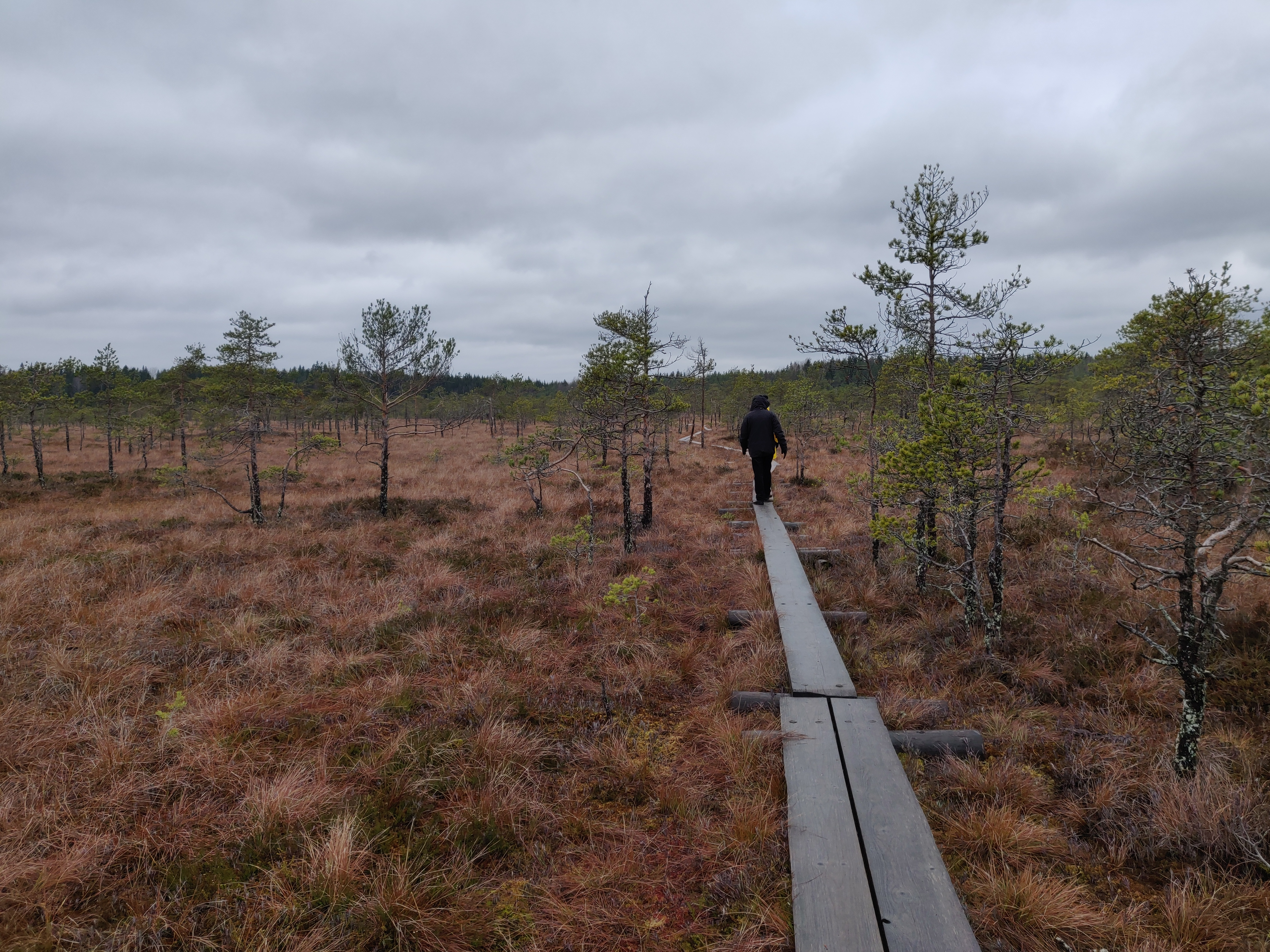 Linnaistensuon näkymiä Lahdessa.